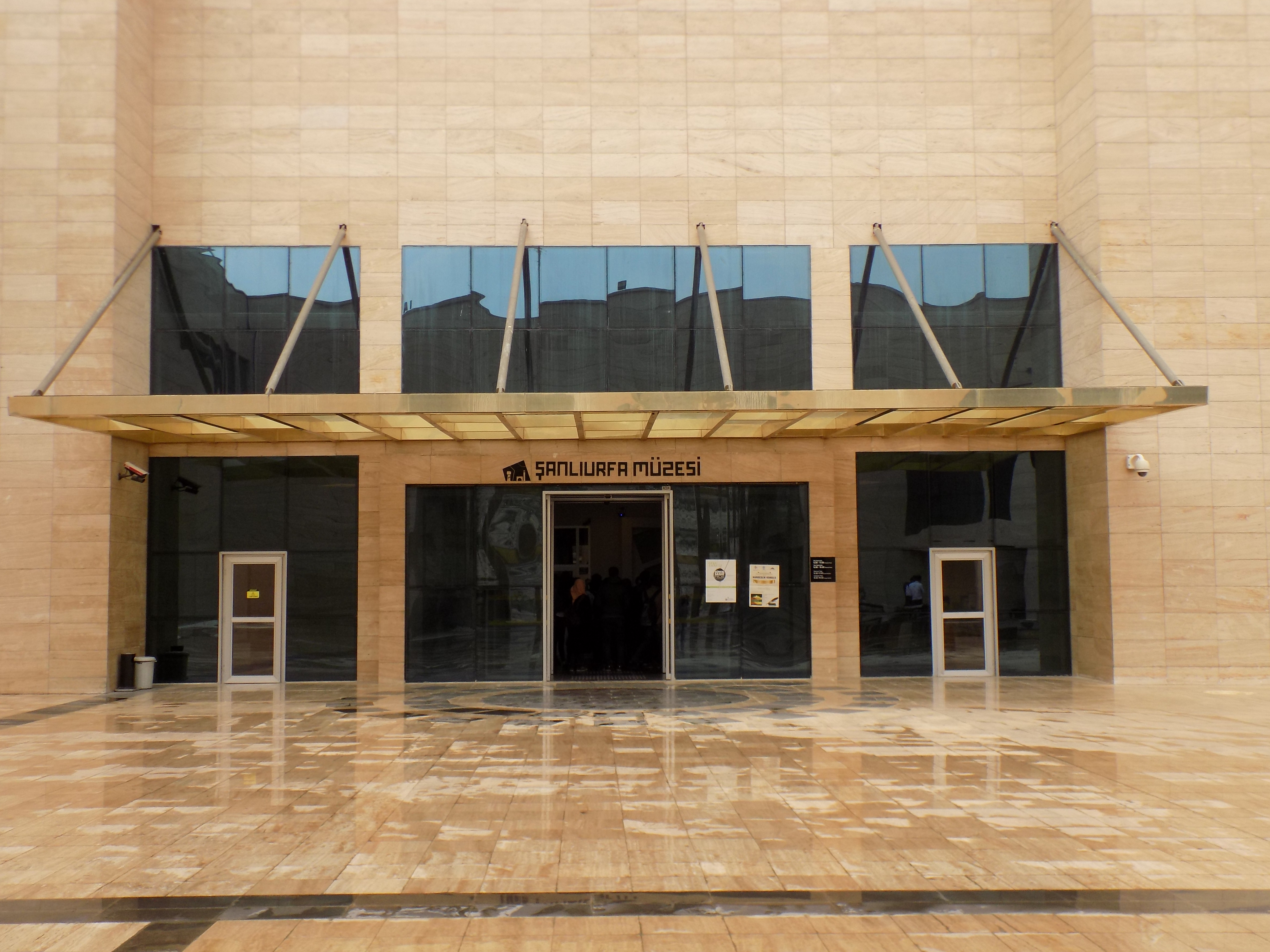 Şanlıurfa Müzesi giriş kapısı.